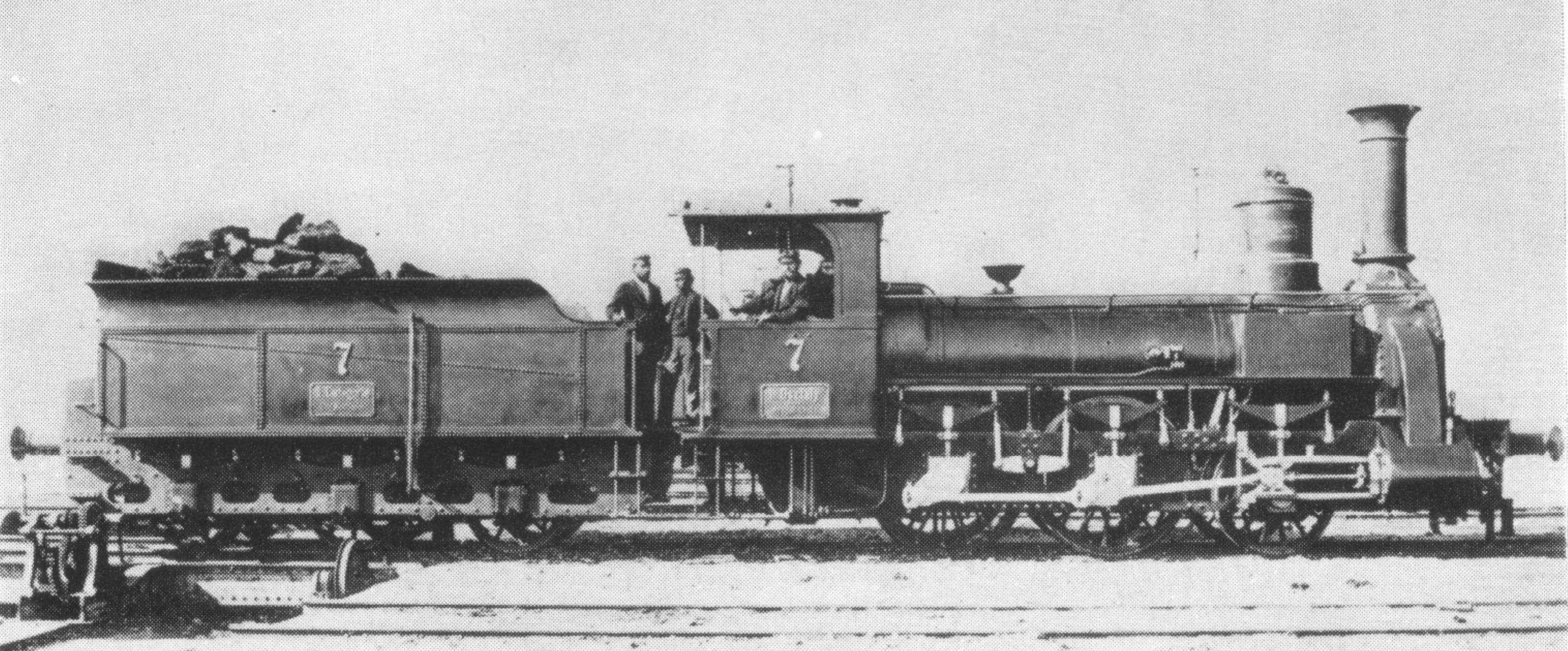 A Magyar Nyugoti Vasút 7 pályaszámú, később MÁV II. osztály, végül 238 sorozatú mozdonya